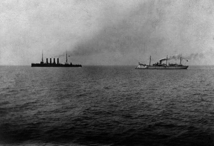 Varyag and Korietz in Chemulpo